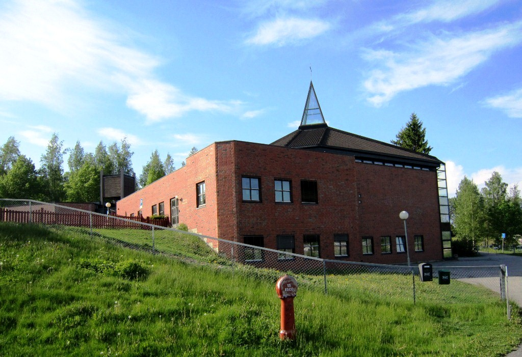 Ski nye kirke, Akershus